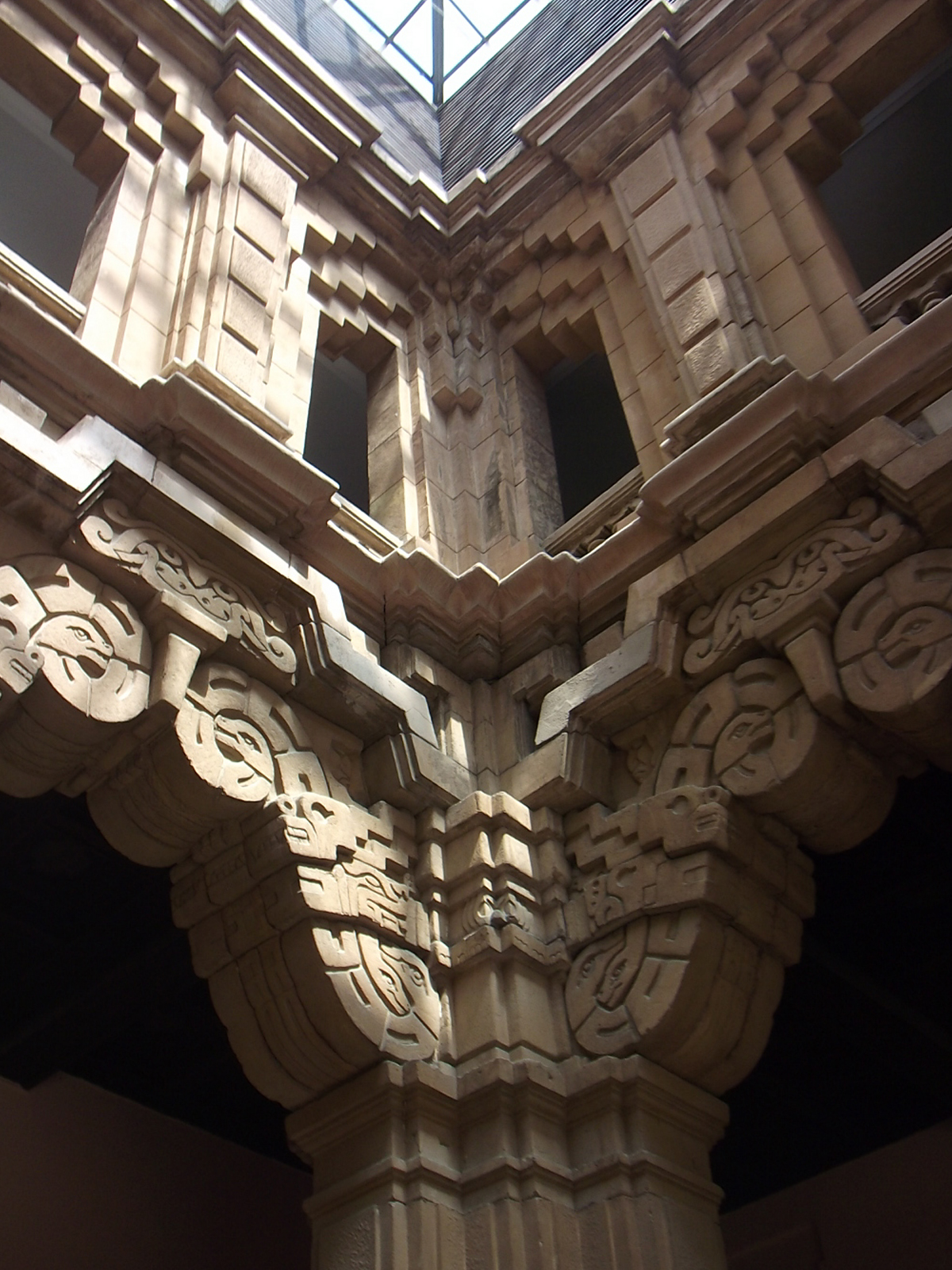 Casa de la Ciencia de Sevilla, Detalle Patio Interior